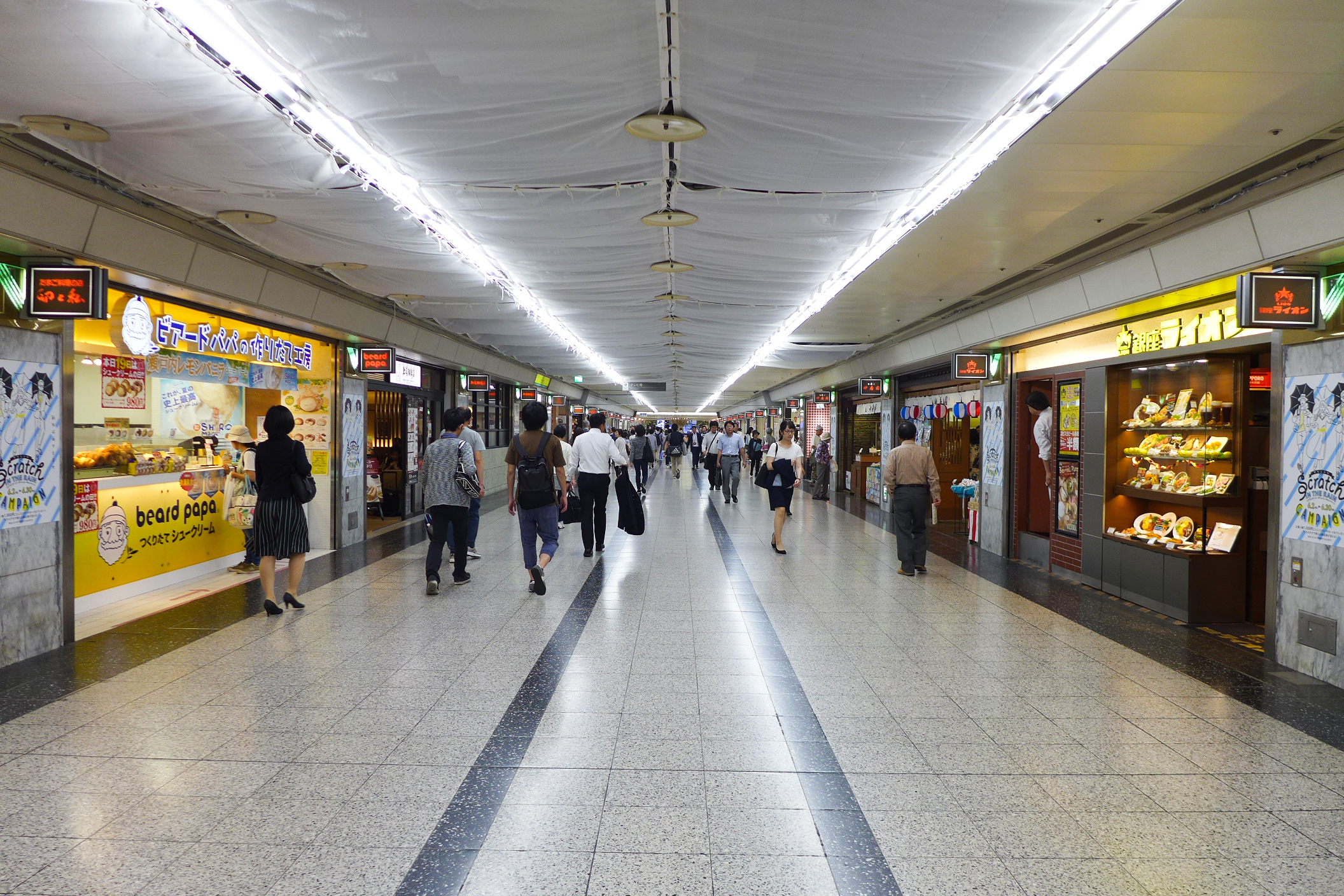 SakaeChika